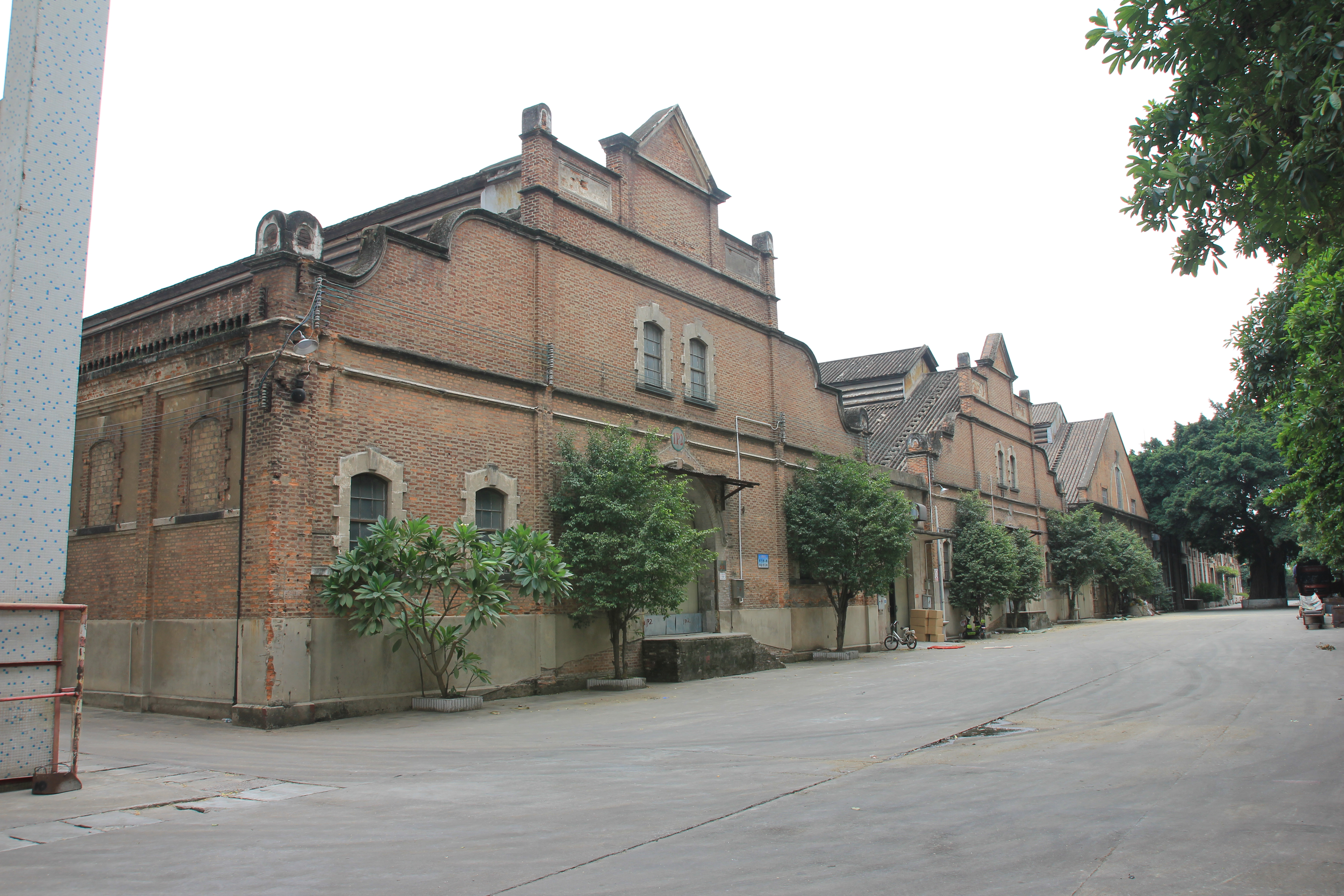 渣甸仓旧址。位于广东省广州市荔湾区